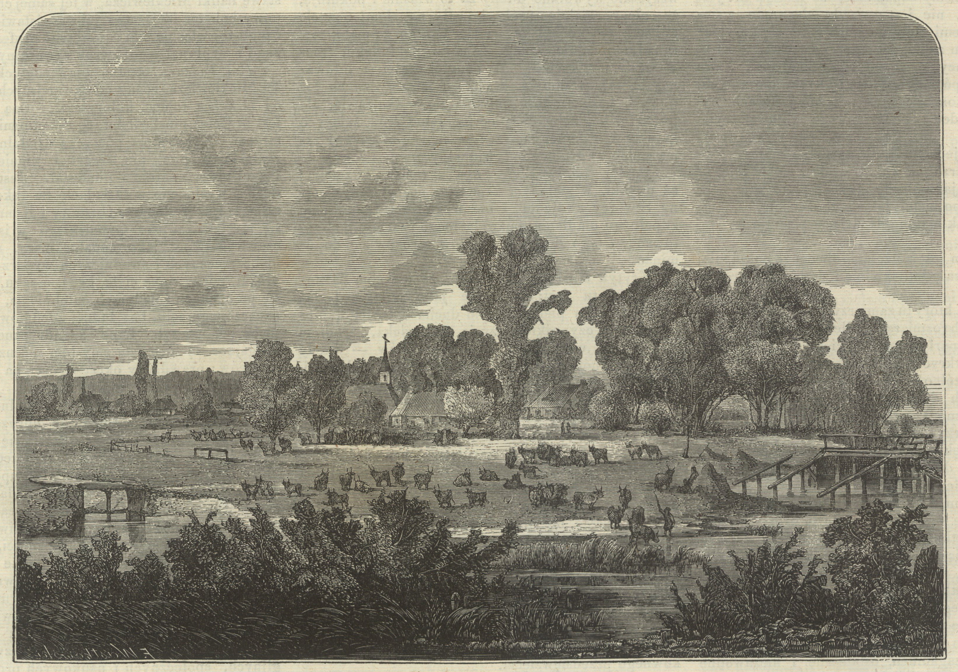 Беларуская (тарашкевіца): Тэрэспаль (Terespal)